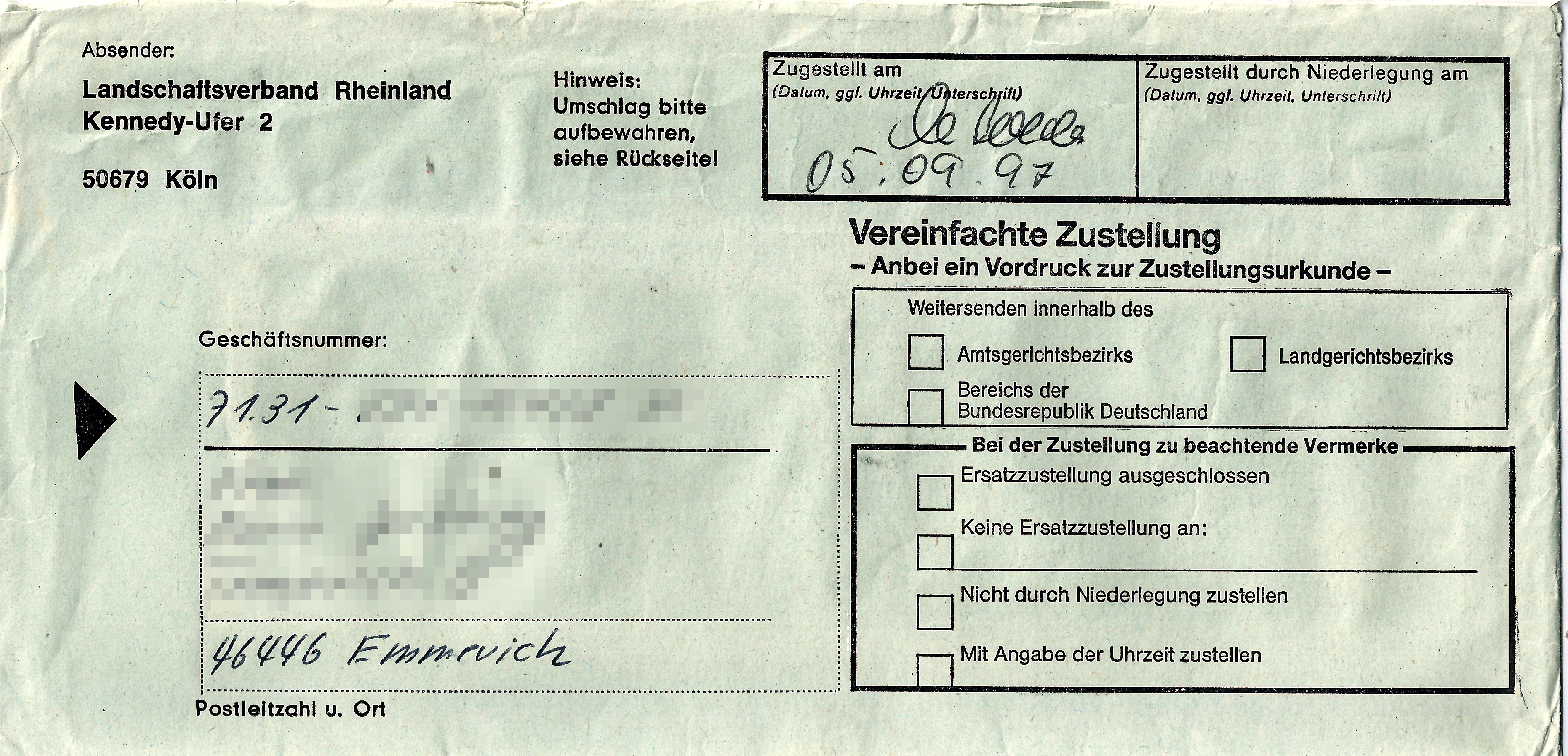 Briefumschlag zur vereinfachten Zustellung (Postzustellungsauftrag) eines Bescheides des Landschaftsverbandes Rheinland, Köln. Der Transport und die Zustellung erfolgte durch die Deutsche Post AG